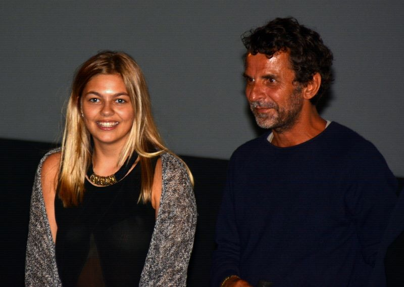 Louane Emera et Eric Lartigau à l'avant-première de "La famille Bélier"